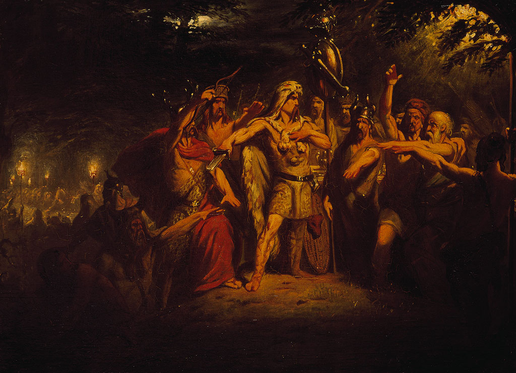 schilderij; Vos, Jacob de; geschiedenis (iconografie)